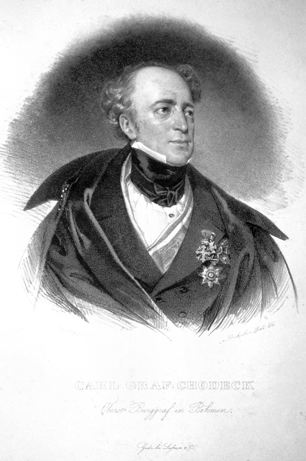 Karl Chotek, Graf von Chotkowa und Wognin (1783-1868), osterreichischer Beamter und Staatsmann, Lithographie von Josef Kriehuber nach einem Gemälde von Friedrich Amerling, 1834